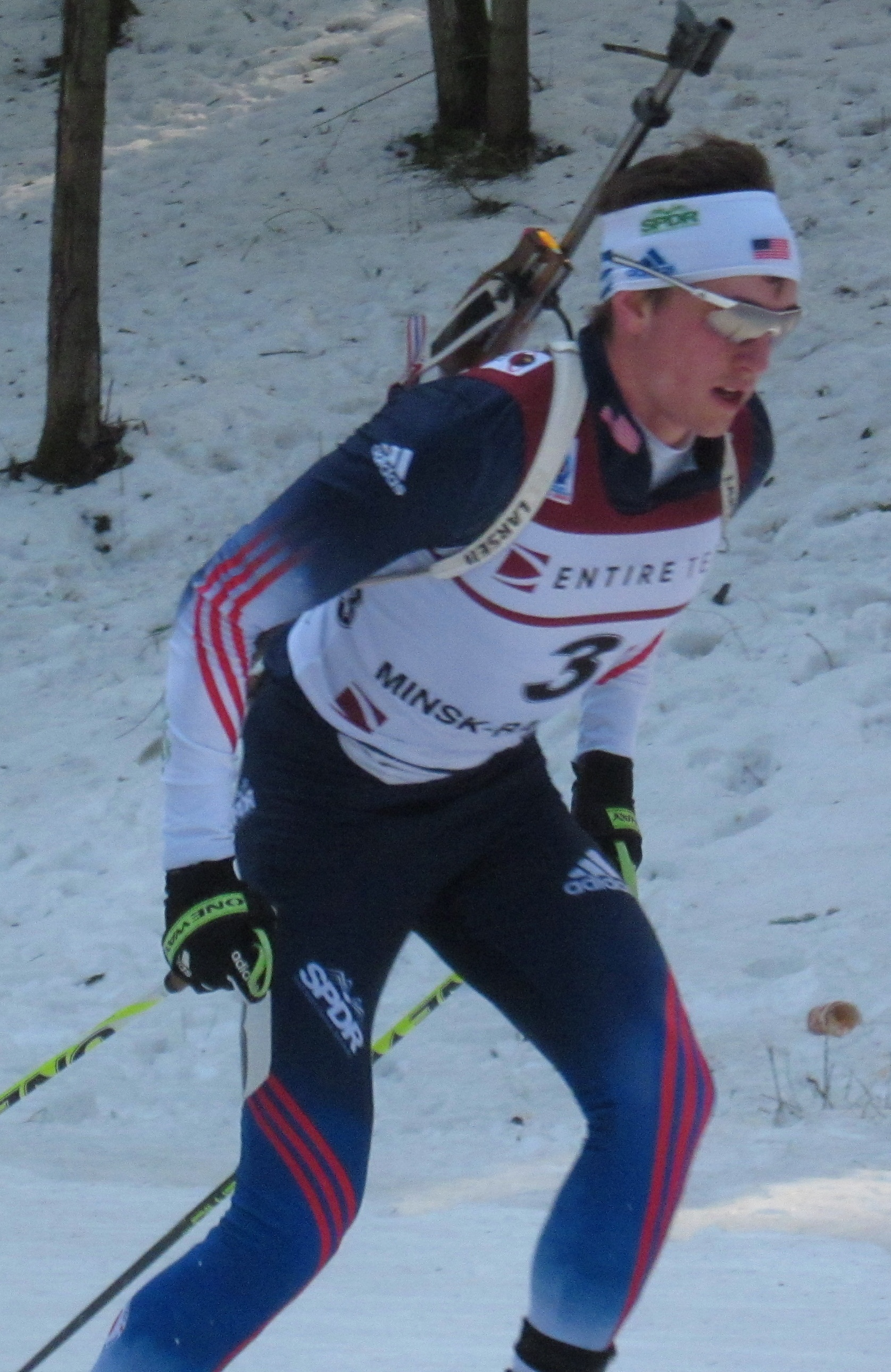 ЮЧМ 2015